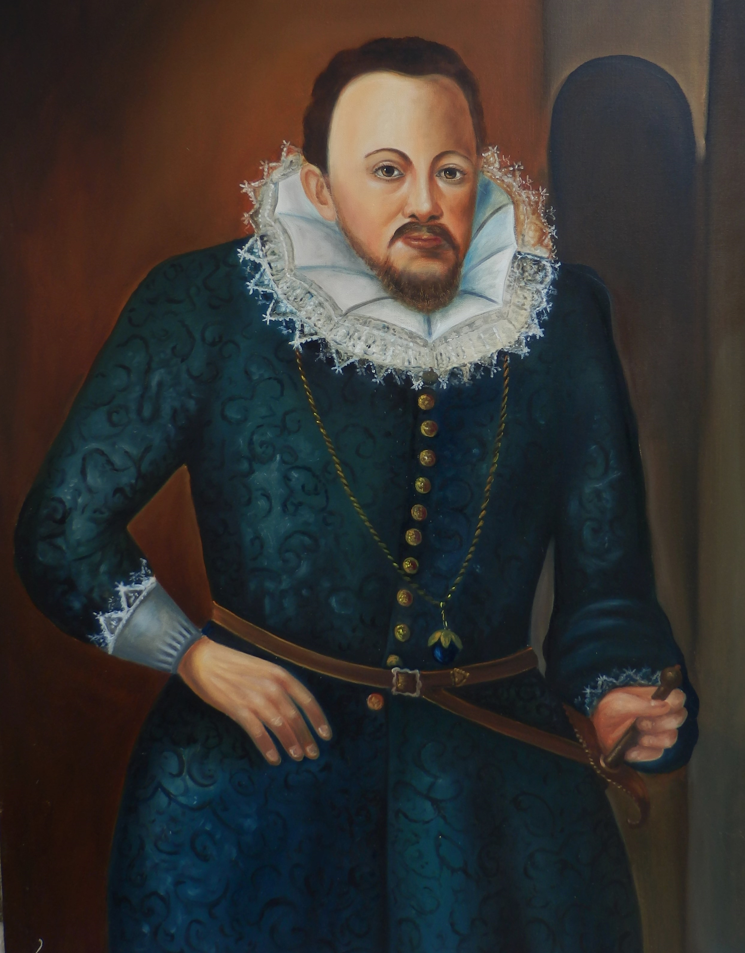 Jáchym Oldřich z Hradce